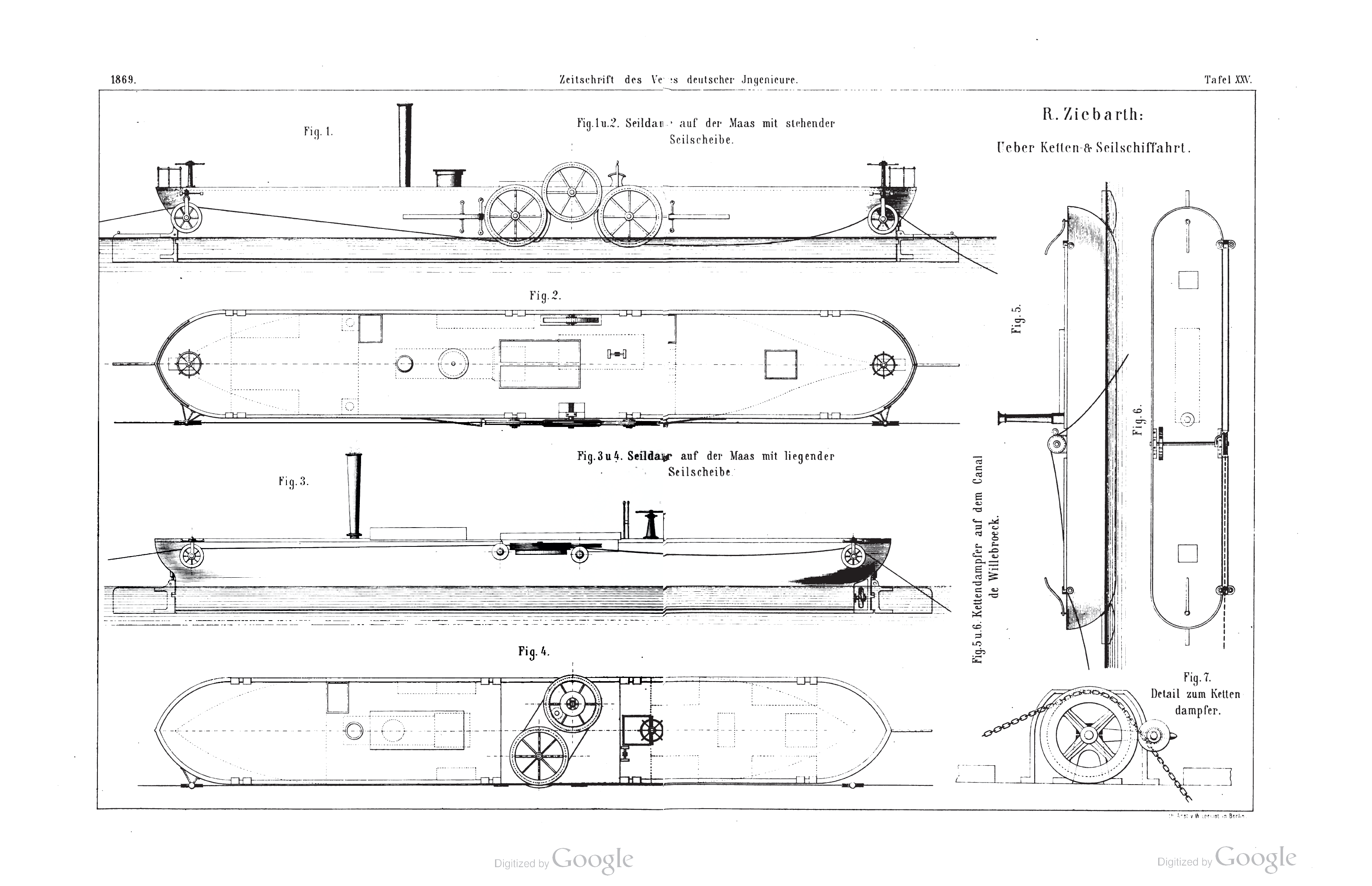 Ueber Ketten- und Seilschifffahrt mit Rücksicht auf die Versuche zu Lüttich im Juni 1869. In: Zeitschrift des Vereins deutscher Ingenieure, Band XIII, Heft 12 , 1869 Seite 737-748, Tafel XXV und XXVI